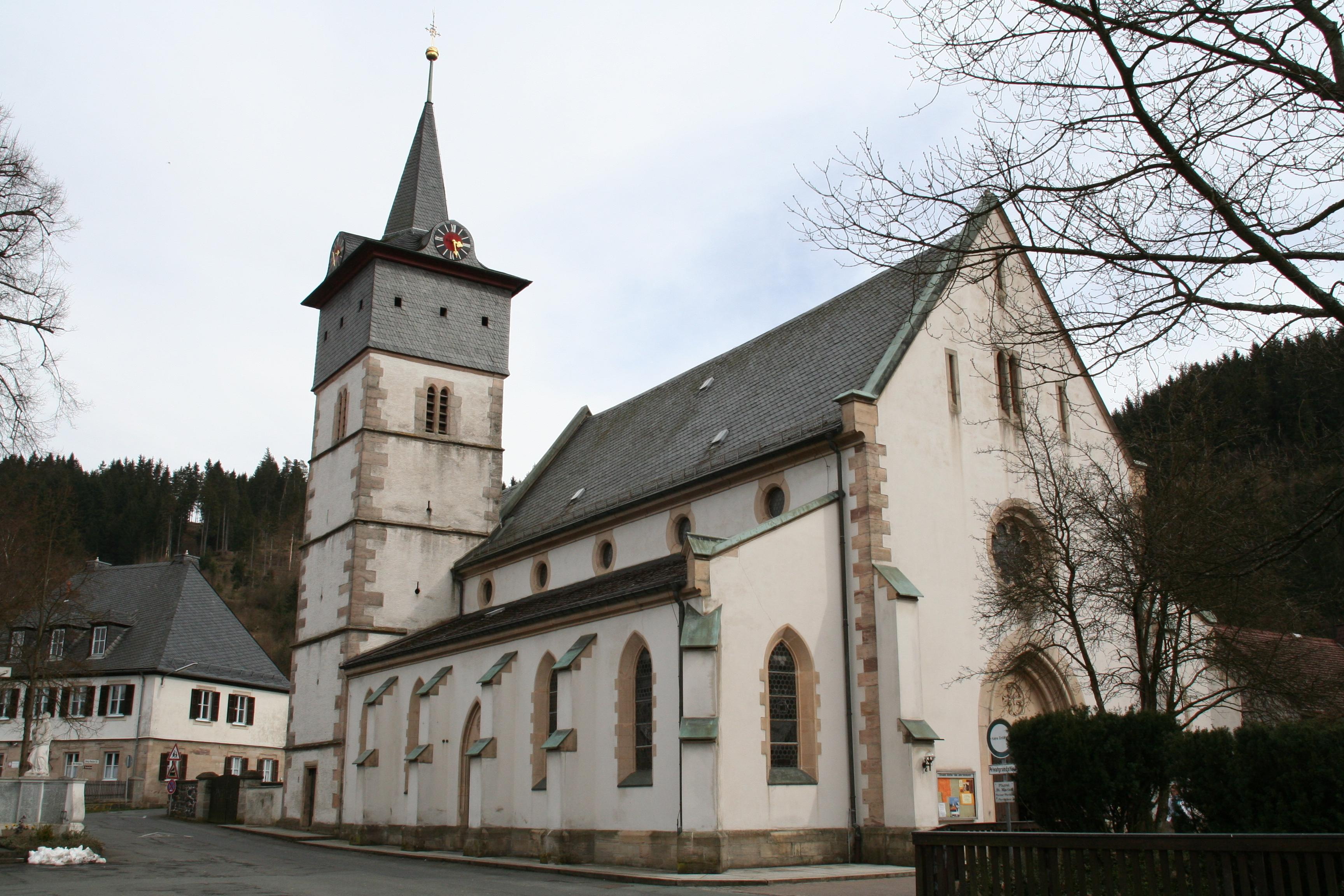 Steinwiesen im Landkreis Kronach, Katholische Kirche St. Marien